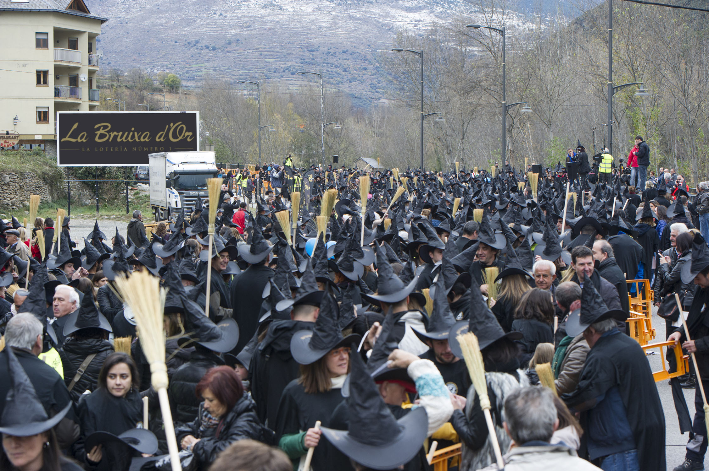 Han llegado las primeras nieves